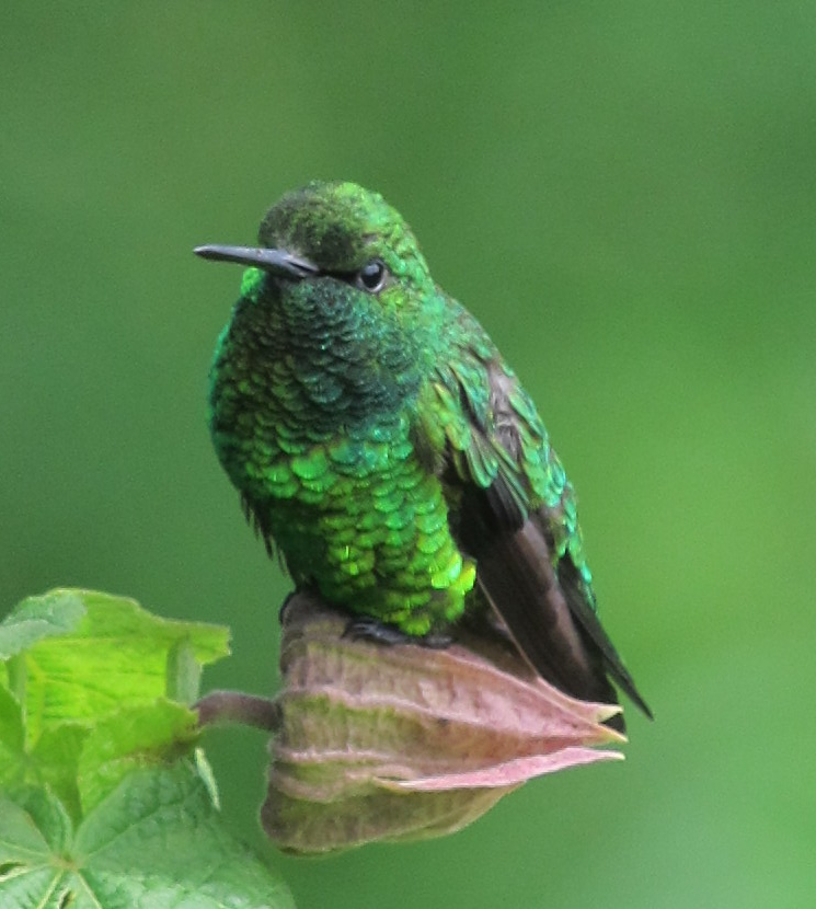 Arcabuco, Boyacá, Colombia (Reserva Rogitama)